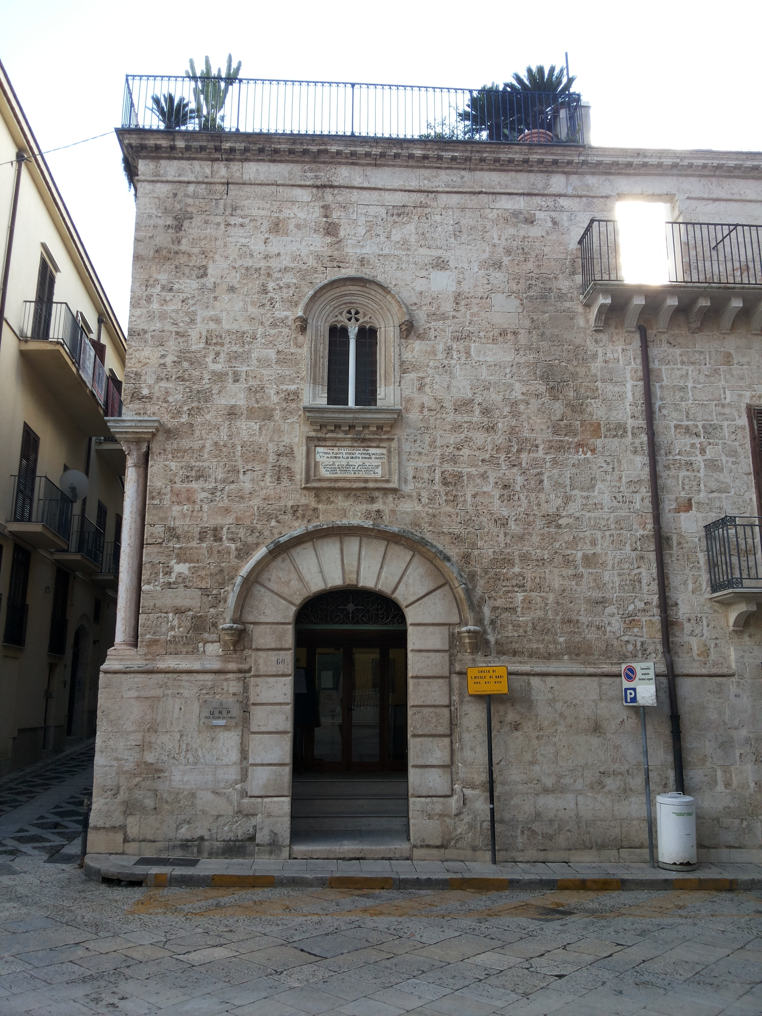 Chiesa San Nicolò di Bari (Alcamo)